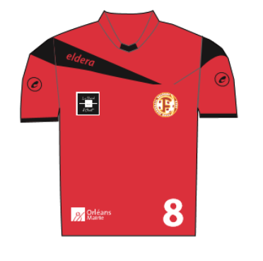 cfohome2016